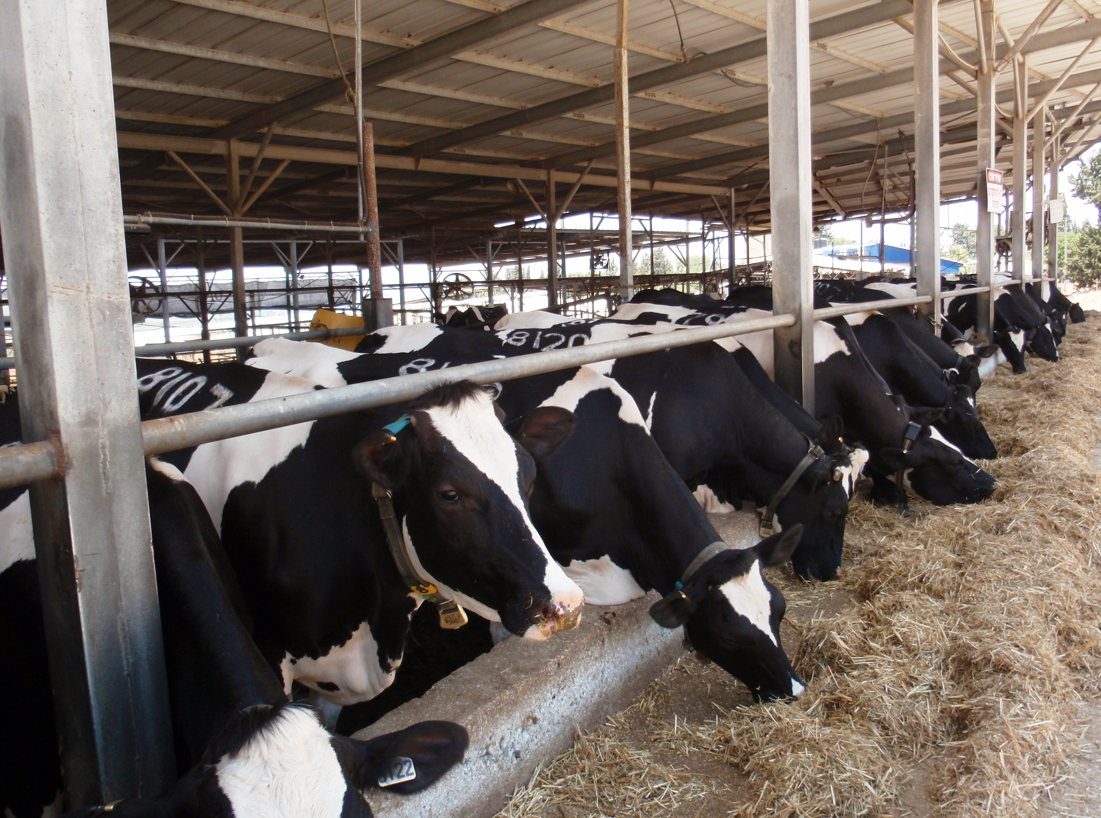 Kibutzim נחשונים רפת חולבות